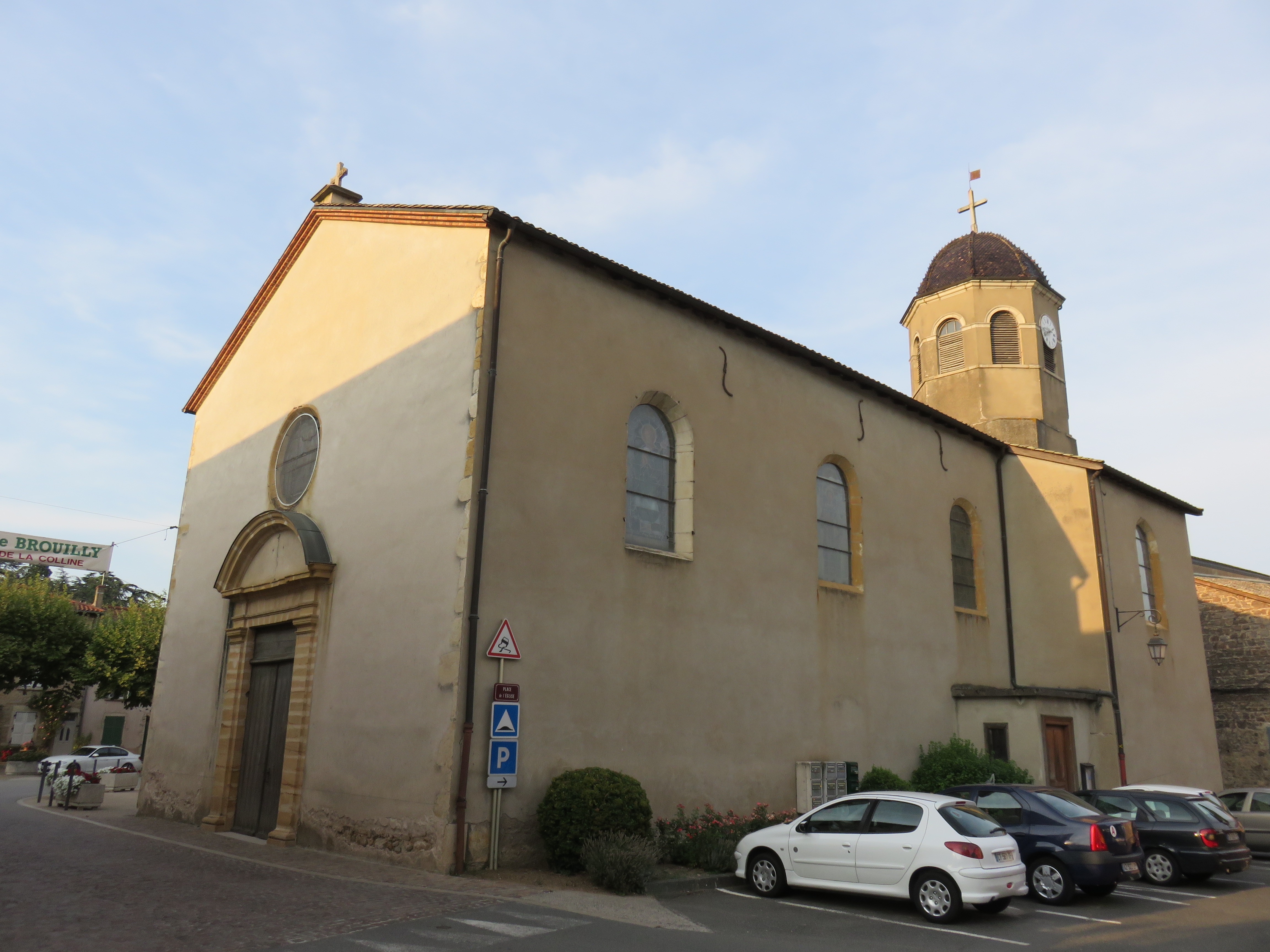 Église de Saint-Lager (Rhône, France).